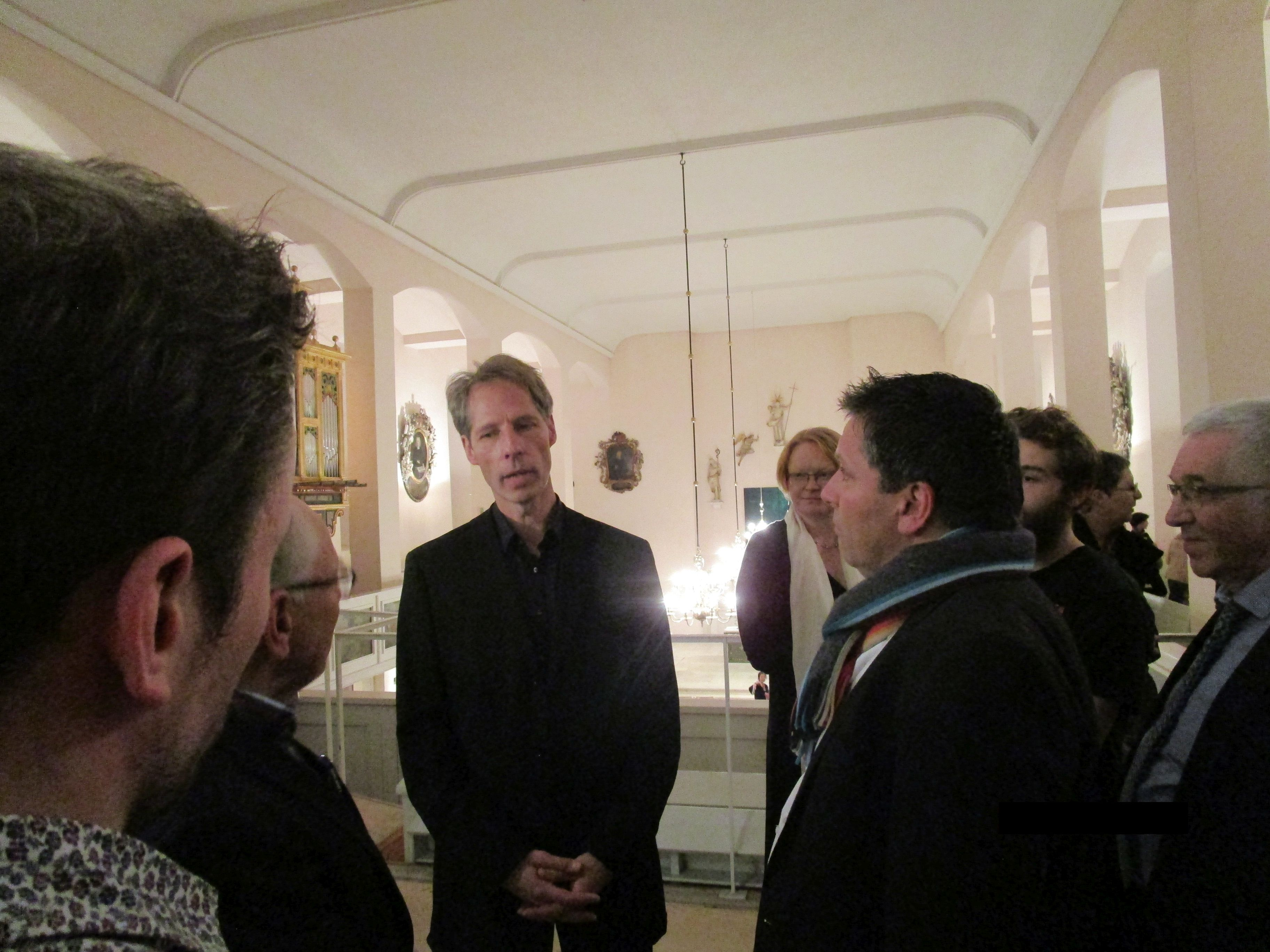 Die Neustädter Hof- und Stadtkirche St. Johannis bekam im Jahr 2019 zusätzlich zur Spanischen Orgel (s. auch Spanische Trompete) eine neue Orgel des belgischen Orgelbauers Dominique Thomas (siehe Orgeln der Neustädter Kirche (Hannover)), die im Eigentum des Landes Niedersachsen steht, denn sie ist ein von Bund und Land je zur Hälfte finanziertes Instrument zur Ausbildung von Studentinnen und Studenten des Studiengangs Kirchenmusik der Hochschule für Musik, Theater und Medien Hannover. Nach dem zwischen Land Niedersachsen und Kirchengemeinde geschlossenen Vertrag steht die Orgel der Musikhochschule 40 Stunden in der Woche für die Ausbildung der Studierenden zur Verfügung. Die neue Orgel wurde am 26. Oktober 2019 von Orgelprofessor Emmanuel Le Divellec (Musikhochschule Hannover) mit einem reinen Programm von Orgelmusik von Johann Sebastian Bach der Öffentlichkeit vorgestellt.